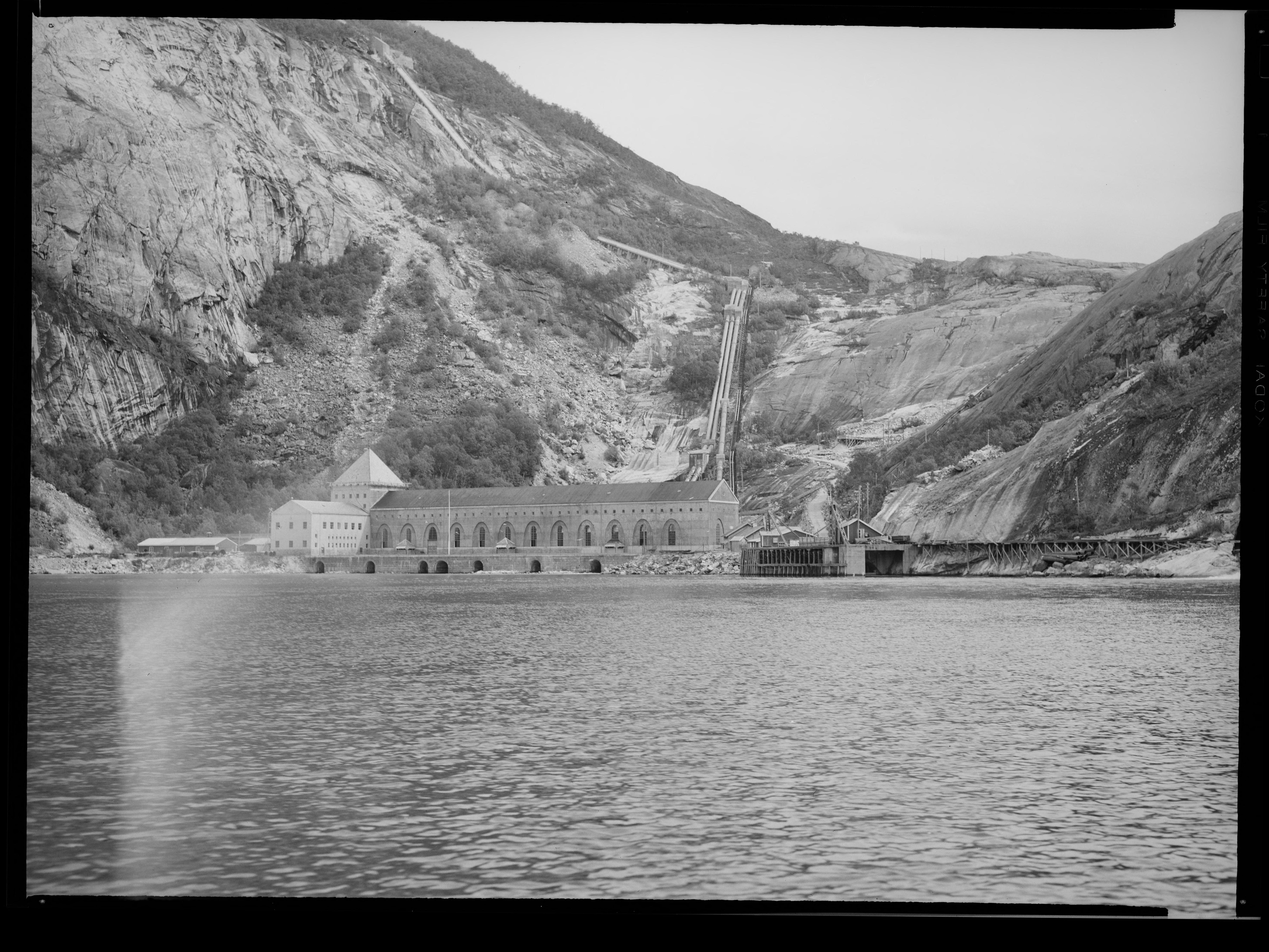 Bildet er hentet fra Nasjonalbibliotekets bildesamling. Anmerkninger til bildet var: Fotograf: LS Glomfjord, Meløy, Nordland